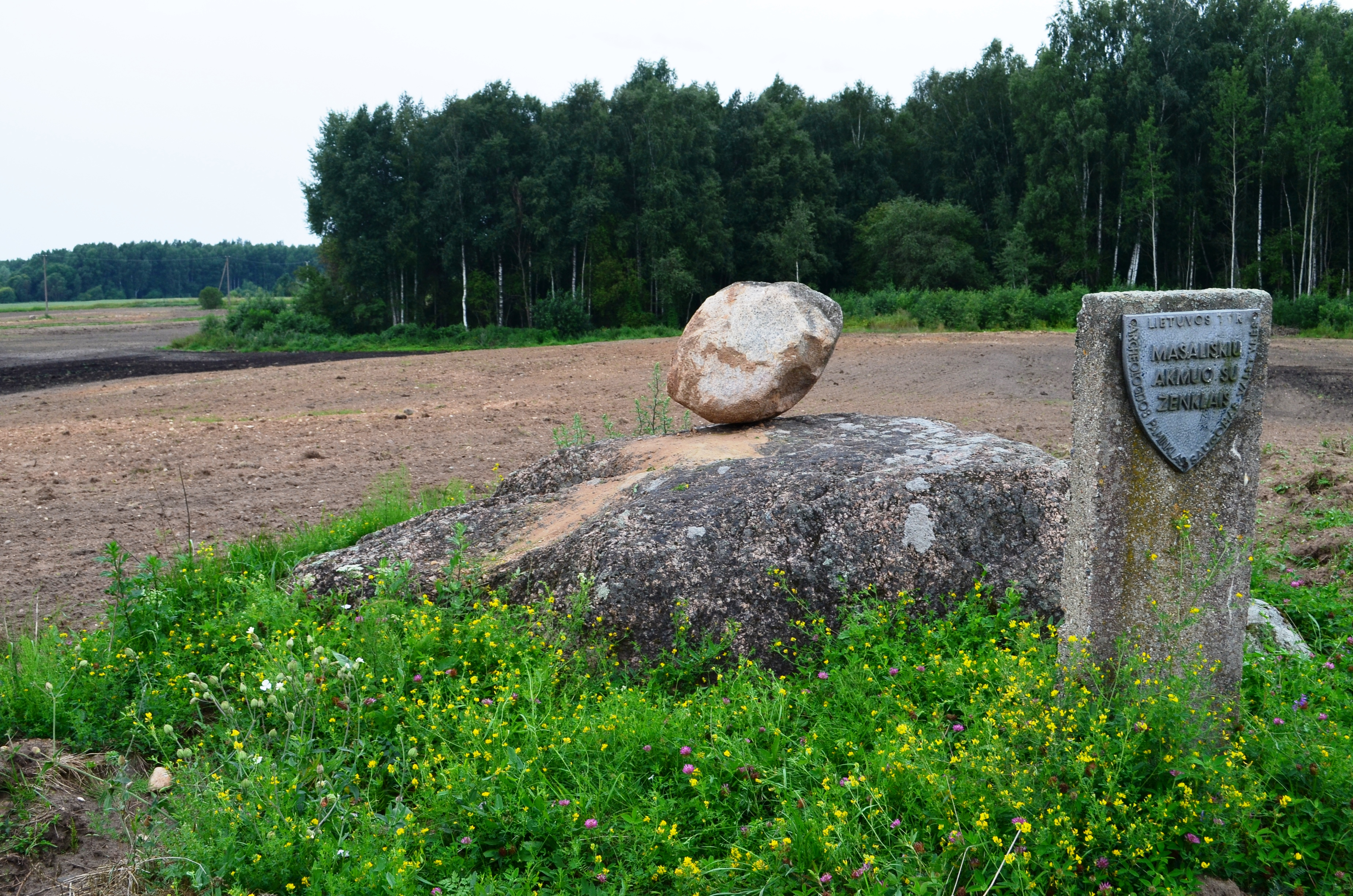 Maseliškių akmuo, Vilniaus r.